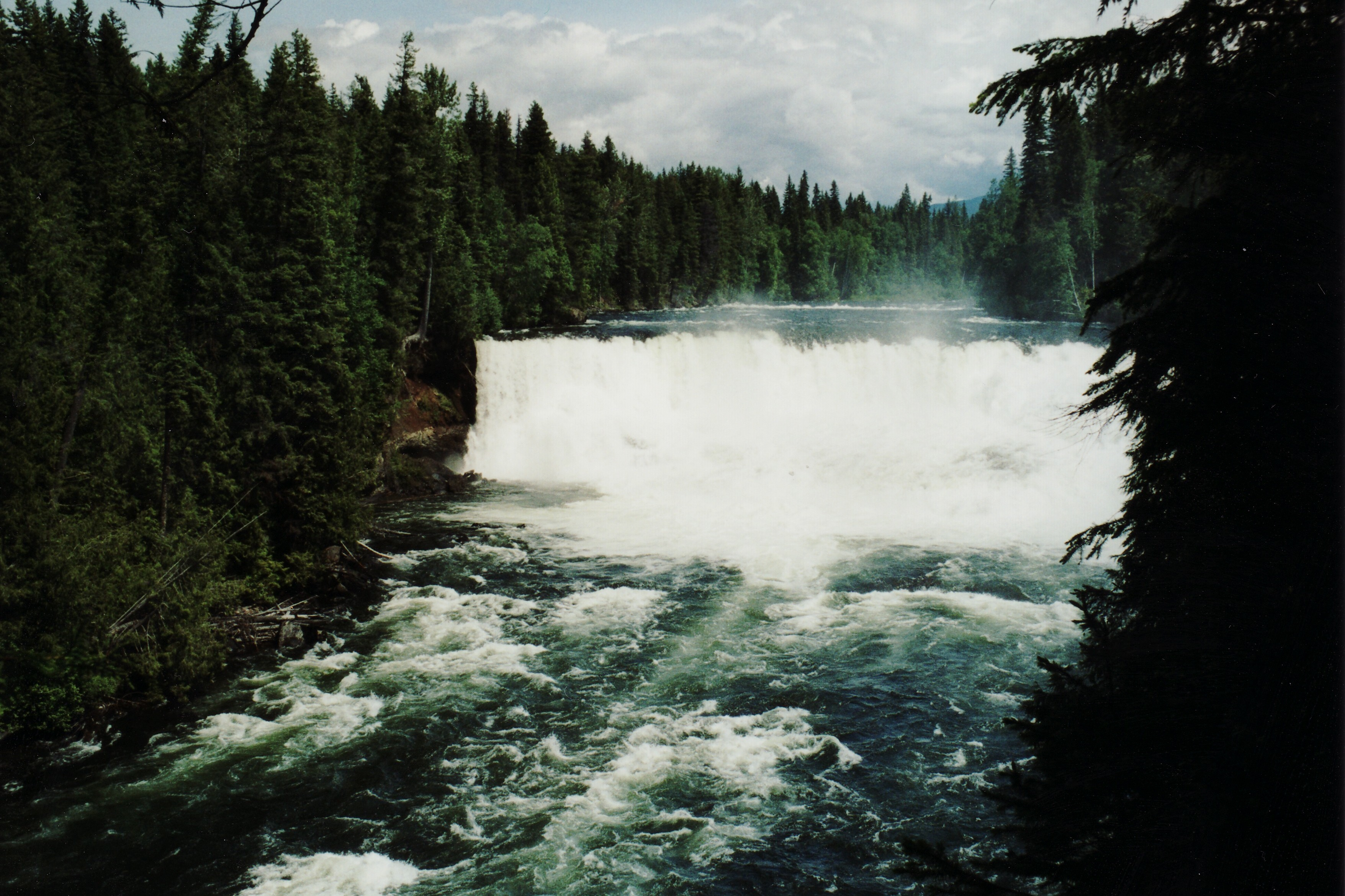 Dawson Falls (Wells Gray Provincial Park)